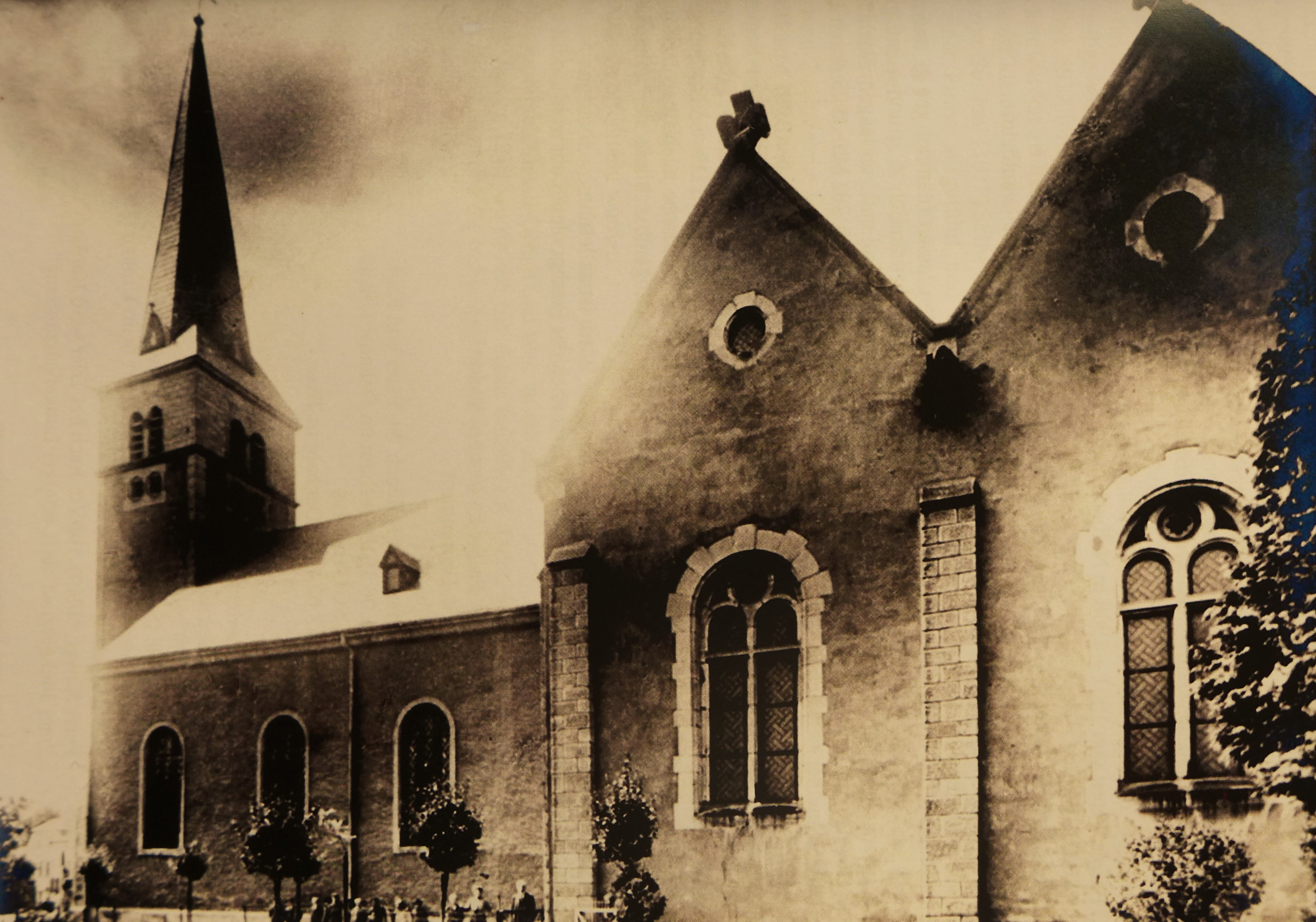 St. Peter und Paul (Nalbach), Seitenansicht der Nalbacher Pfarrkirche nach dem Umbau der Jahre 1891–1892 durch Wilhelm Hector (Pfarrarchiv Nalbach)